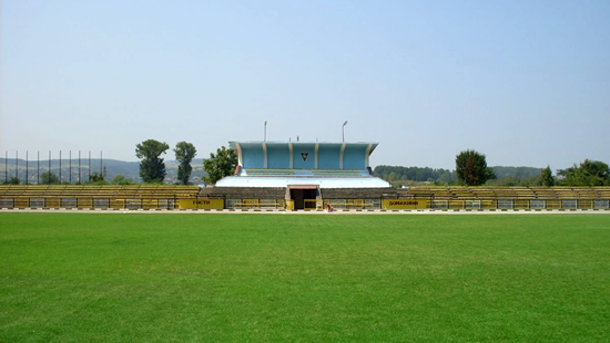 Градски стадион - Червен бряг